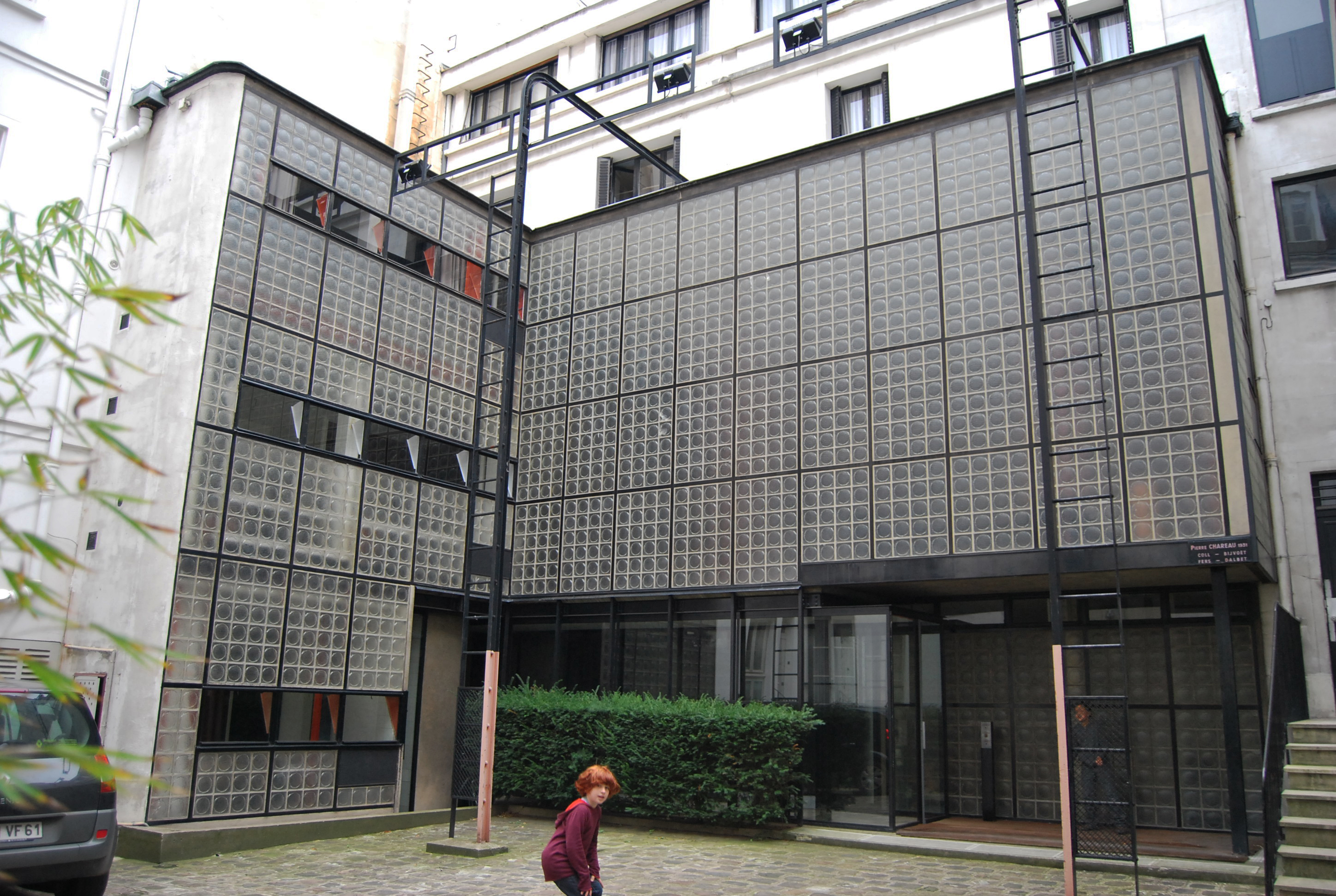 La Maison de Verre est un projet réalisé par l'architecte-décorateur Pierre Chareau et l'architecte Bernard Bijvoet, 31, rue Saint-Guillaume à Paris VIIe arrondissement, pour le docteur Dalsace entre 1928 et 1931